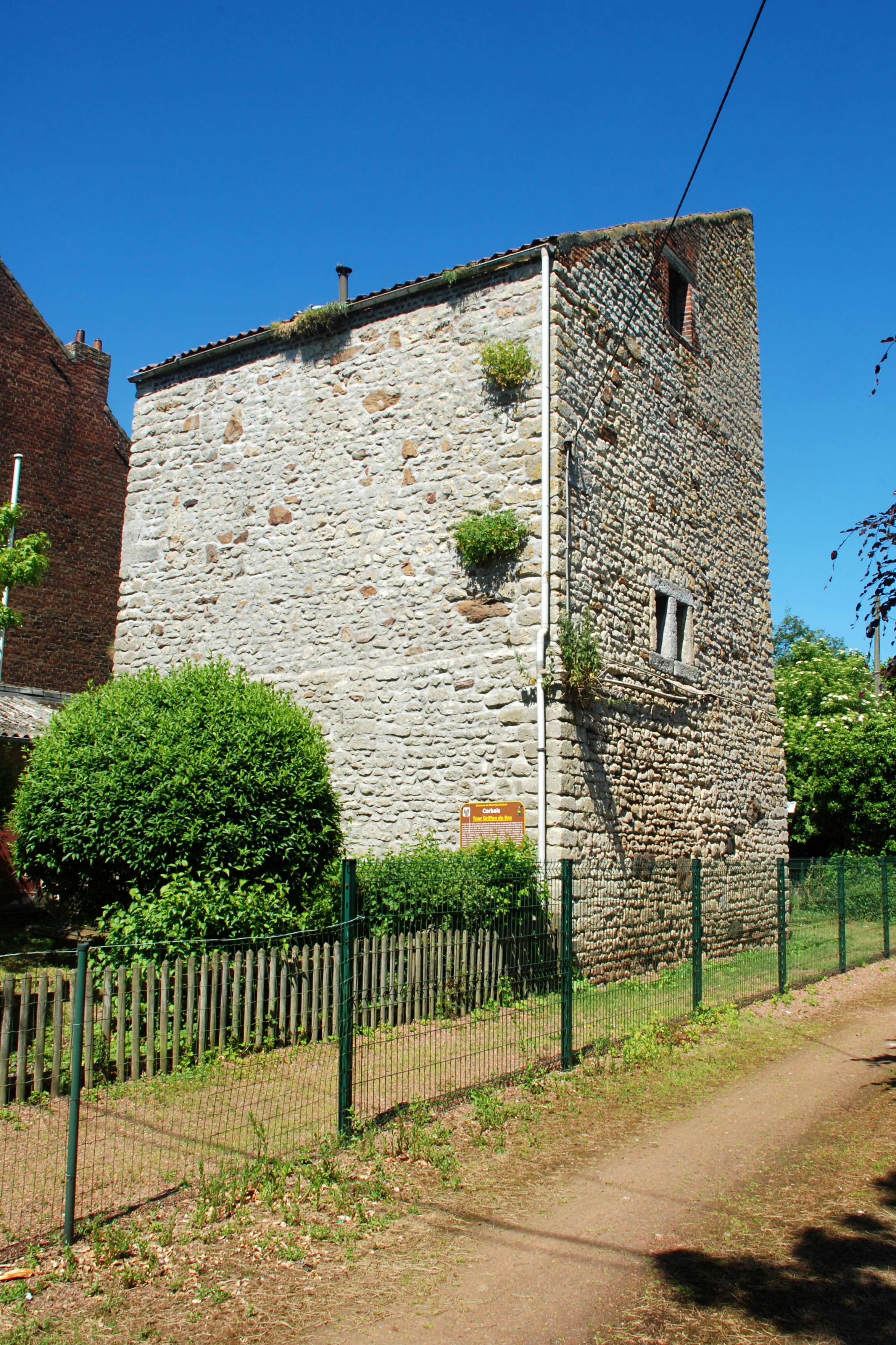 Belgique - Brabant wallon - Mont-Saint-Guibert - Corbais - Tour Griffon du Bois (donjon de Corbais, 13e siècle)